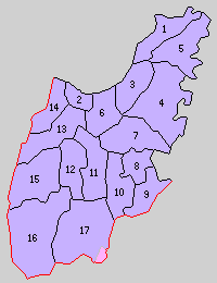 福岡県企救郡の町村制時点の町村。